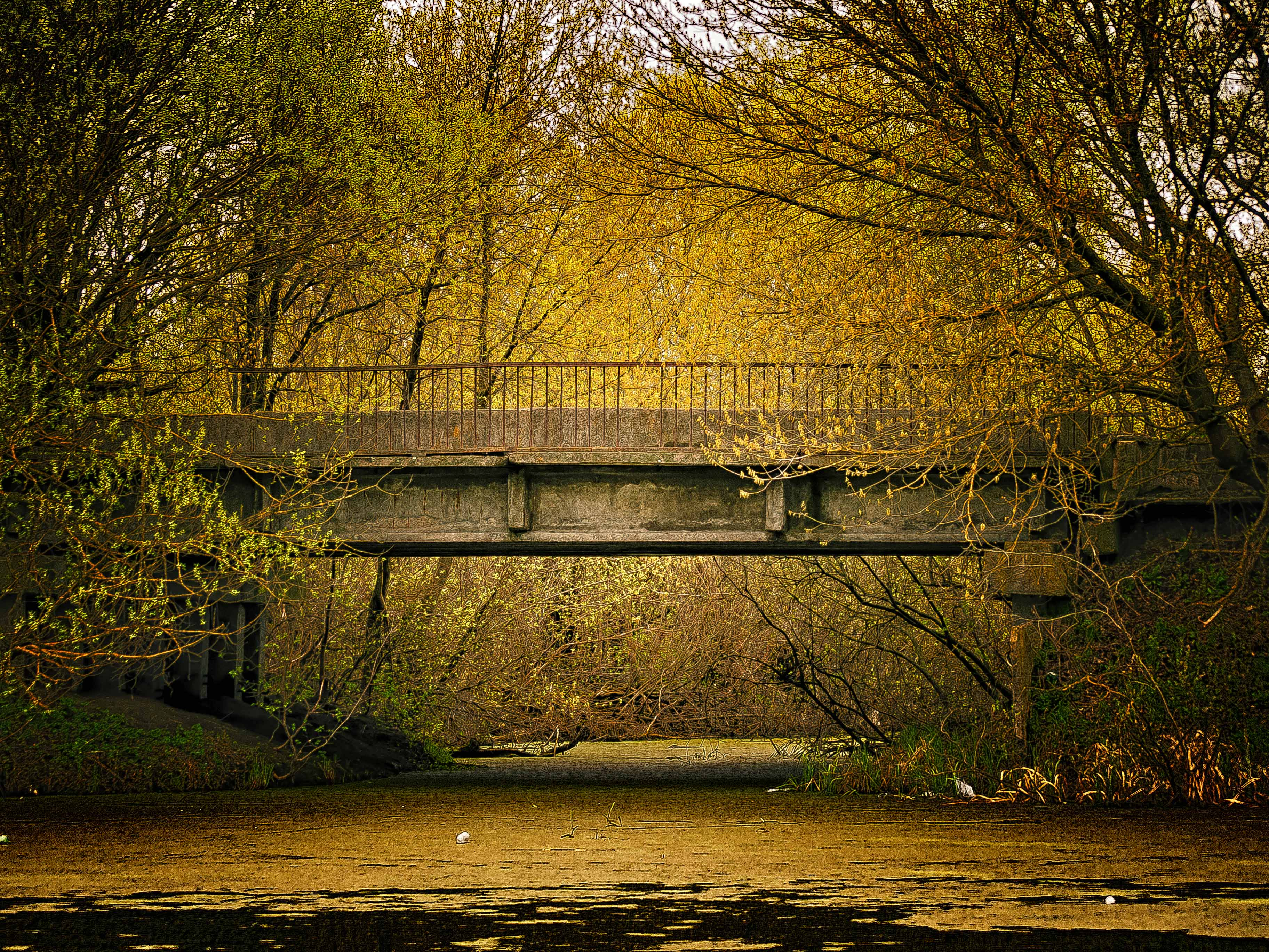 Бук європейський, Літинський район, Уладівська сільська рада, Уладівське лісництво, кв.67 поблизу с. Гущинці